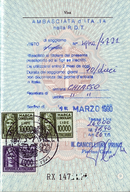 Reisepass DDR, Visum für Italien, 15. März 1990 (Zeitraum: nach dem Fall der Mauer; vor der Währungsunion)